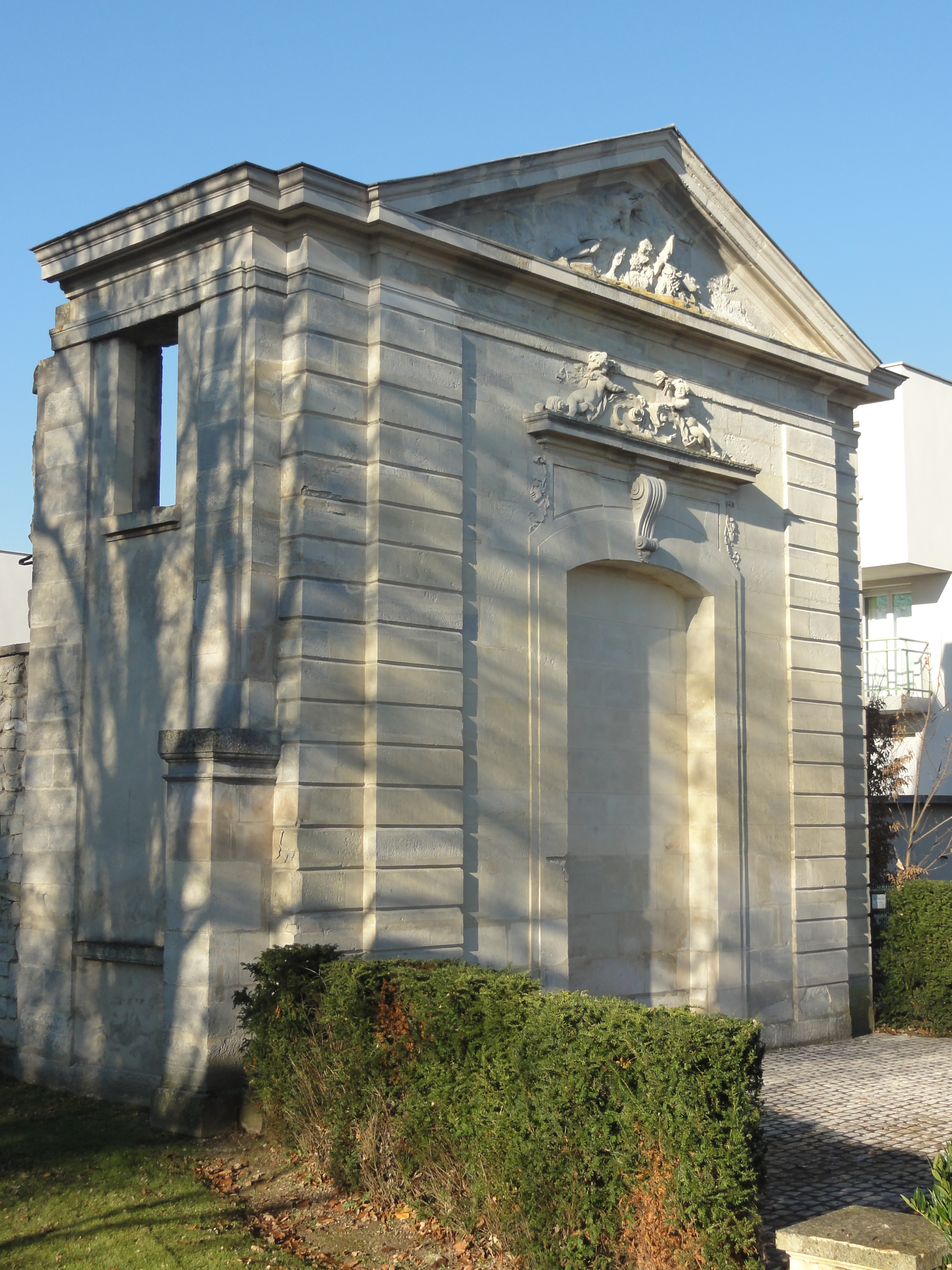 Portail est des écuries de l'ancien château.